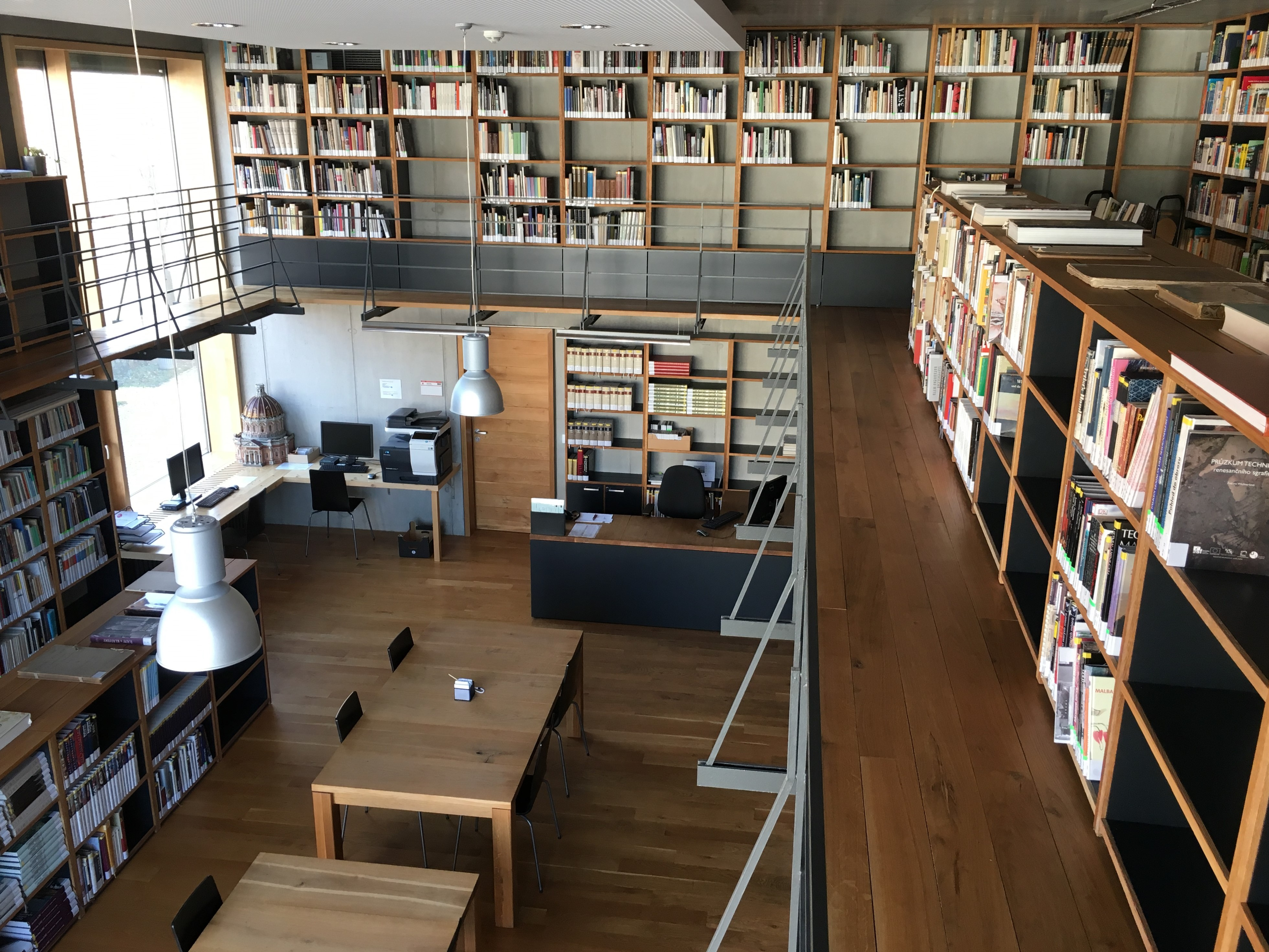 Interiér knihovny v přístavbě piaristické koleje v Litomyšli